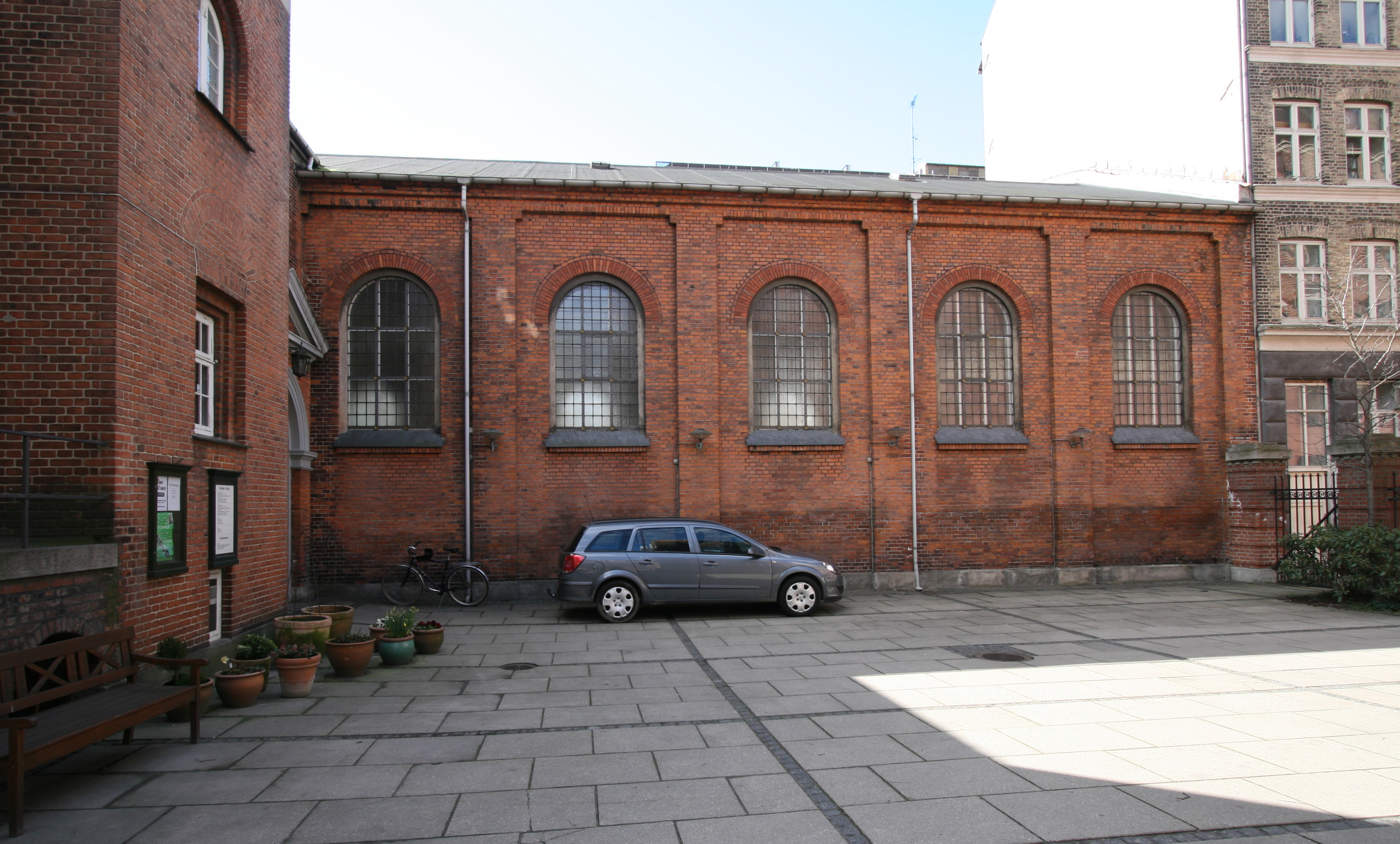 Fredens Kirke, Østerbro, Denmark. Fredens Kirke